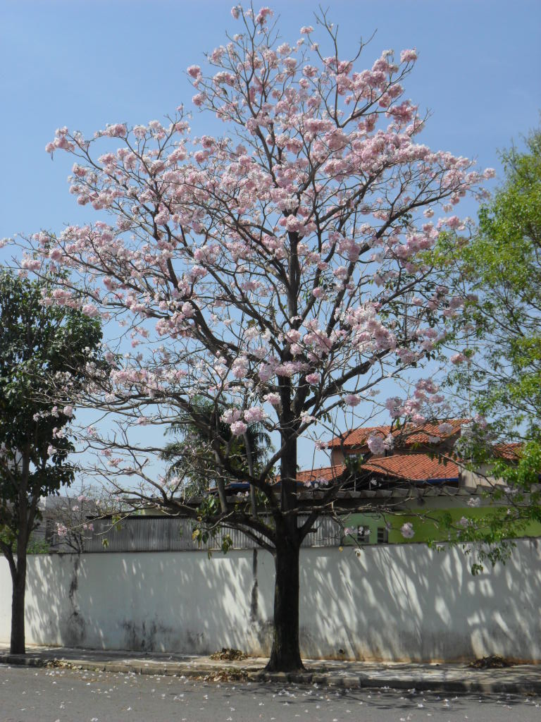 Primavera em Barão Geraldo, 2011